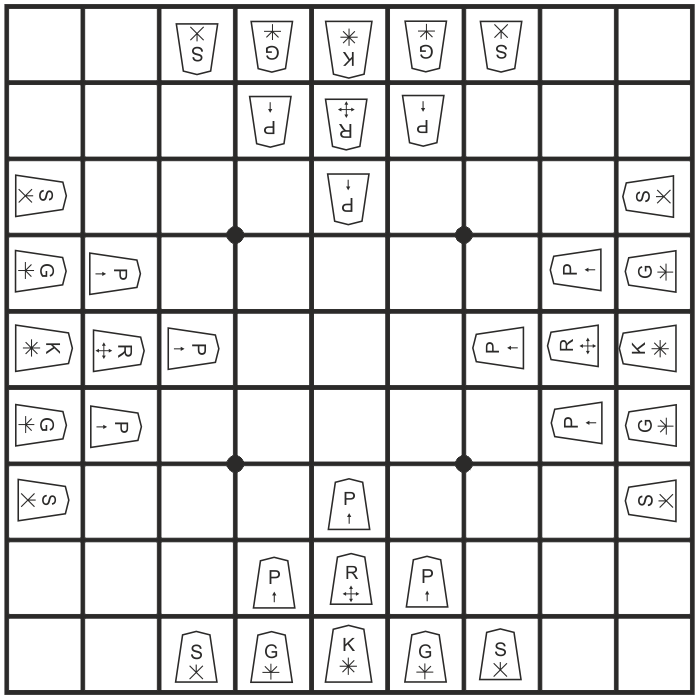 Rozestavení hracích kamenů v Yonin Shogi.